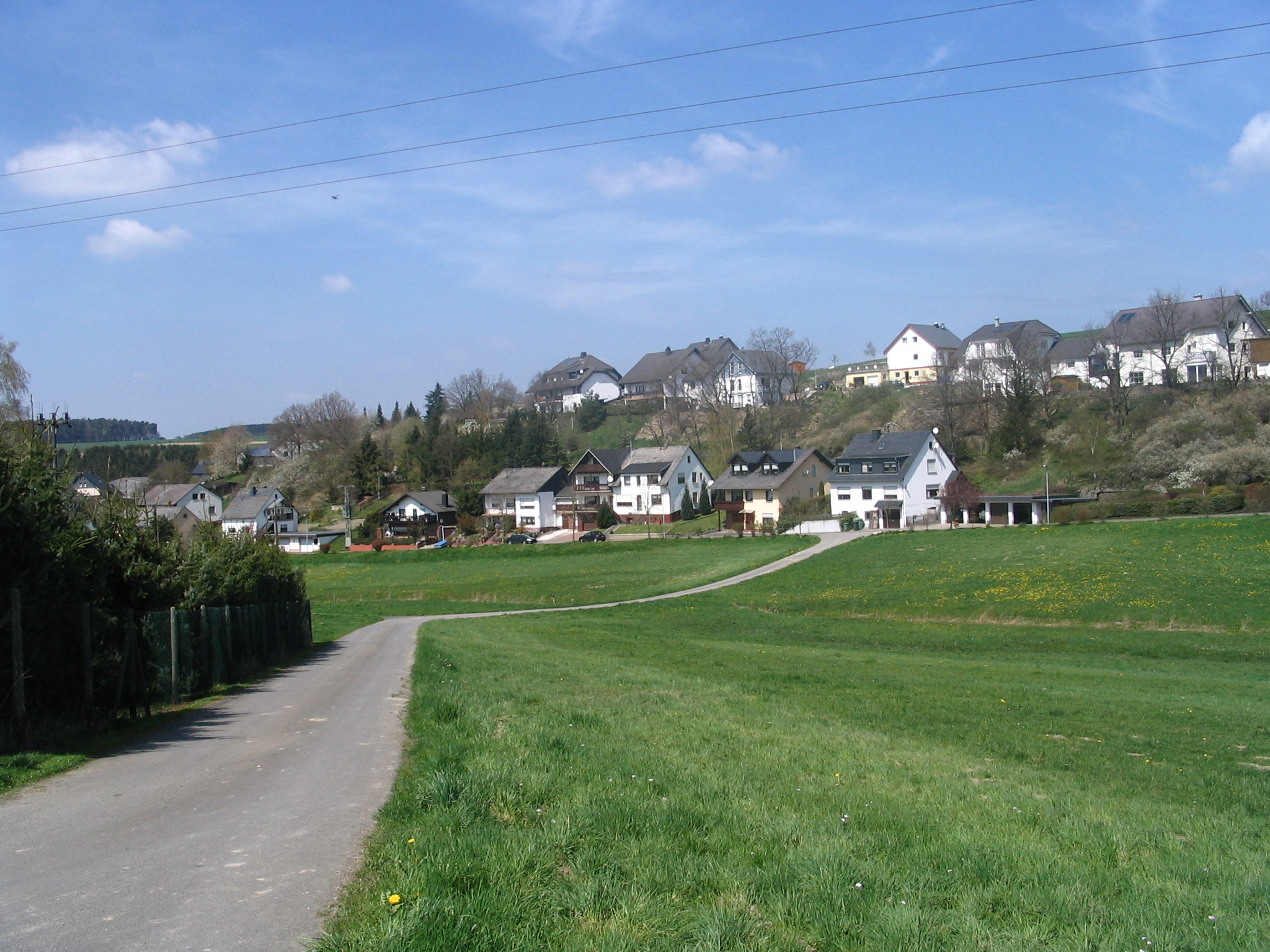 Belgweiler in the Hunsrück landscape, Germany